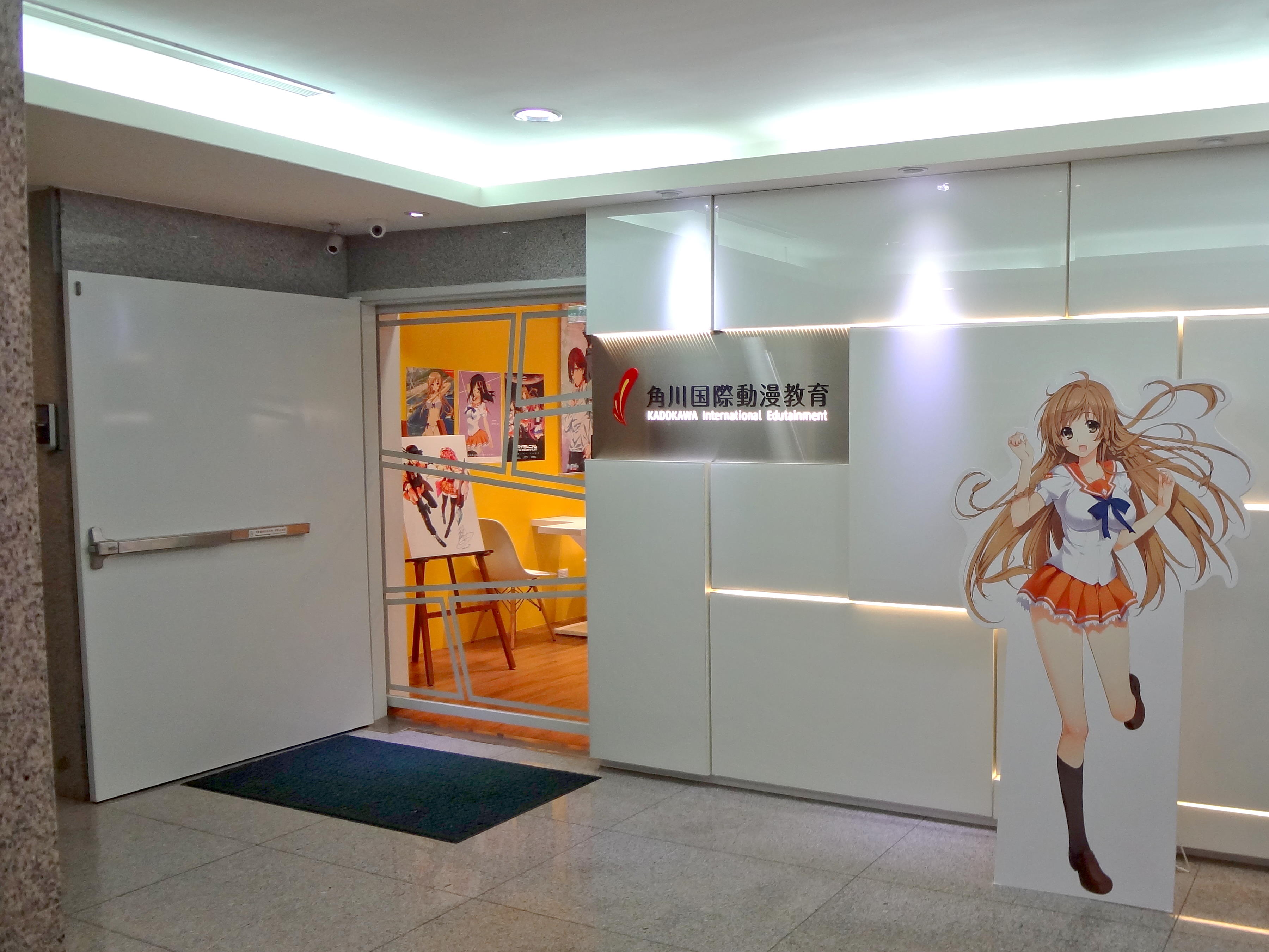 台灣角川國際動漫股份有限公司角川國際動漫教育，位於臺北市中正區館前路43號7樓（中國人壽館前大樓）。最右方為末永未來人形立牌。